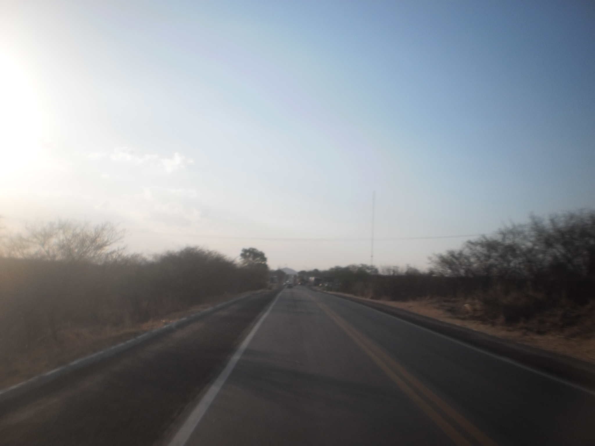 BR-230 em Cajazeiras, Paraíba, na saída para o estado do Ceará.